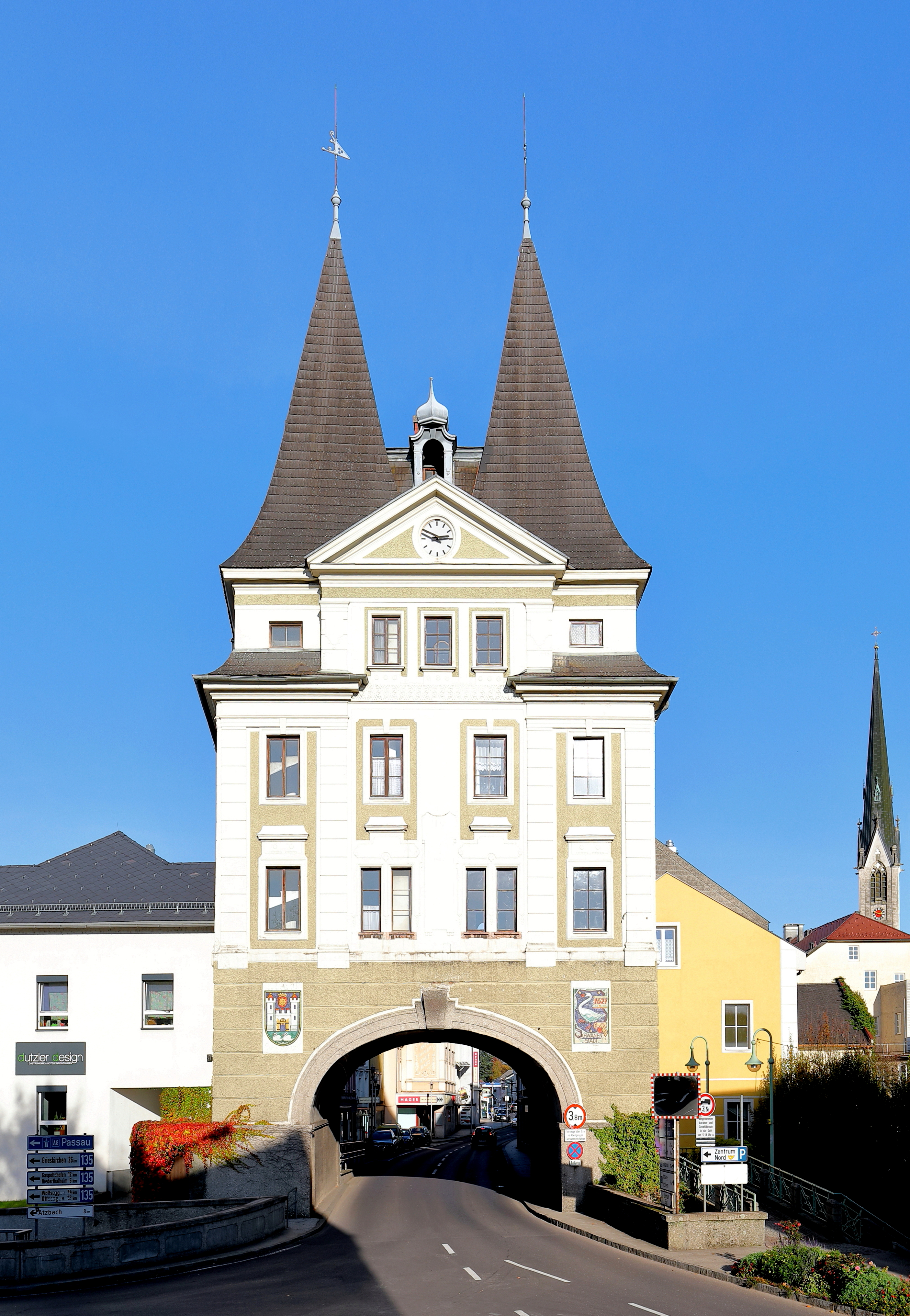 Das Stadttor der oberösterreichischen Stadtgemeinde Schwanenstadt. Ganz rechts der weithin sichtbare 78 Meter hohe Turm der Stadtpfarrkirche.